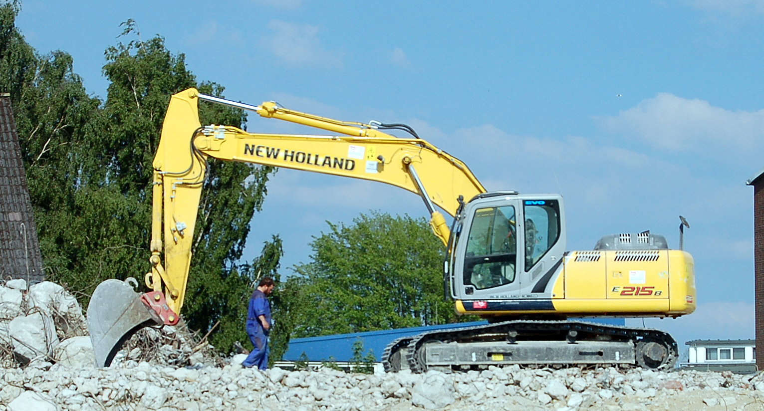 New Holland E215B in Uetersen